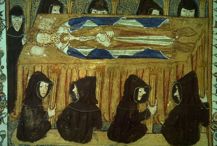 Filip IV. Francouzský